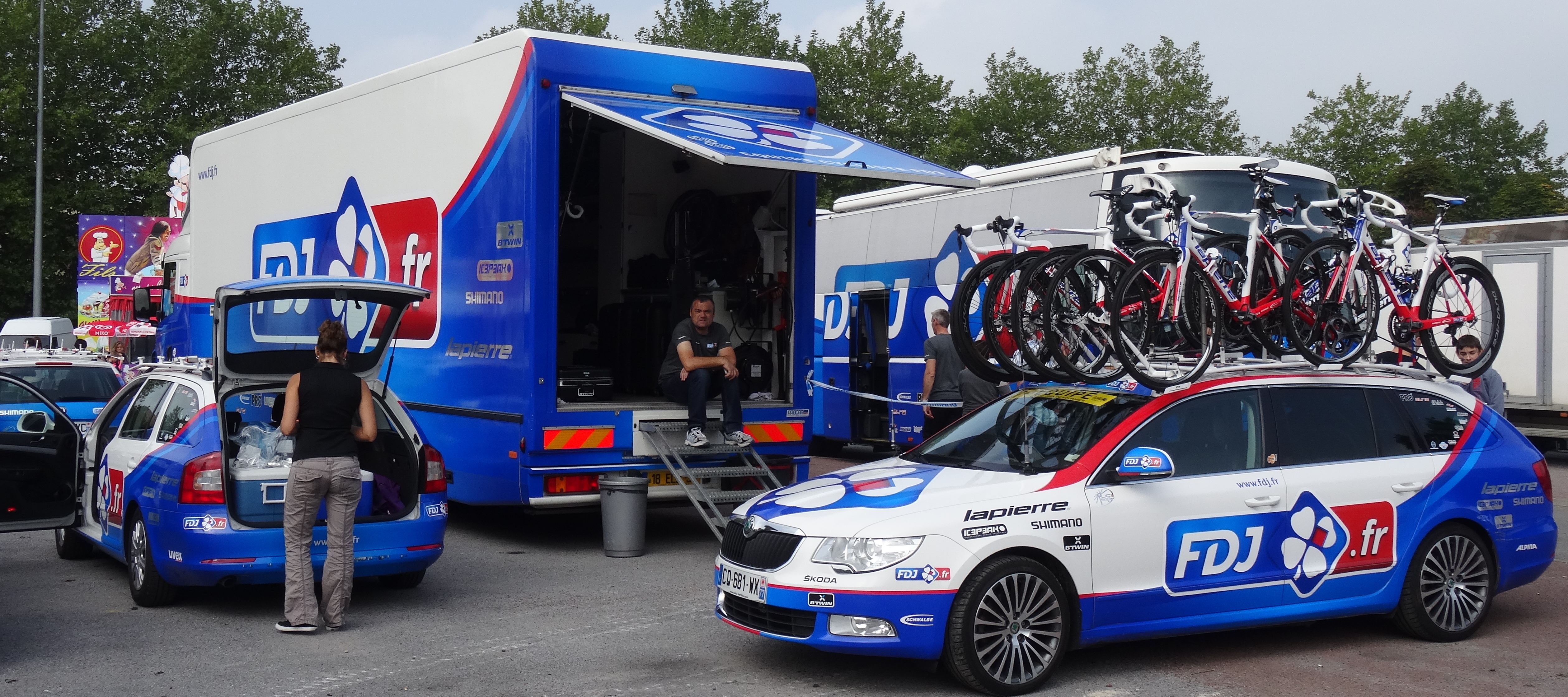 Reportage photographique réalisé le dimanche 7 septembre à l'occasion du départ et de l'arrivée du Grand Prix de Fourmies 2014 à Fourmies, Nord-Pas-de-Calais, France.